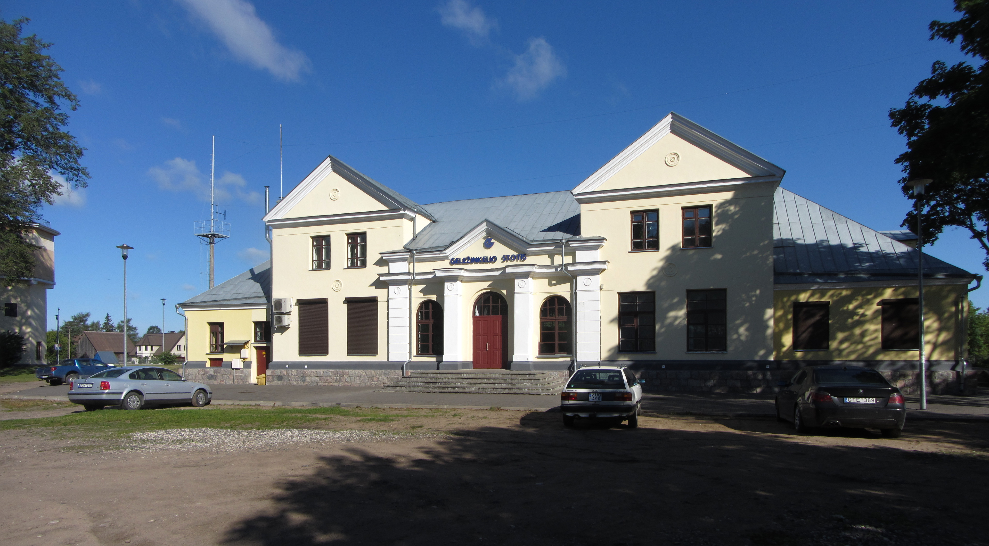 Pabradė, Lithuania